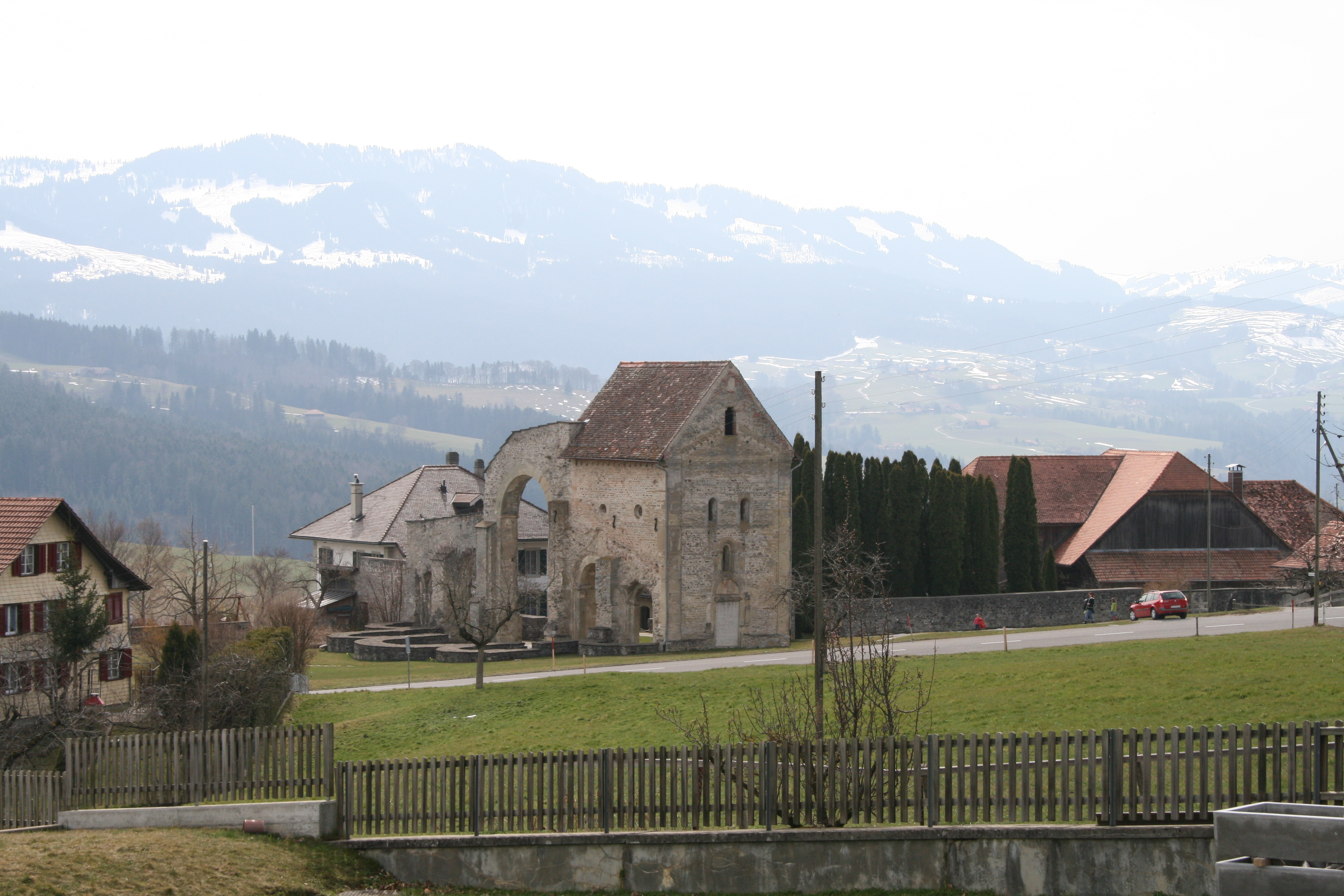 Kloster Rüeggisberg